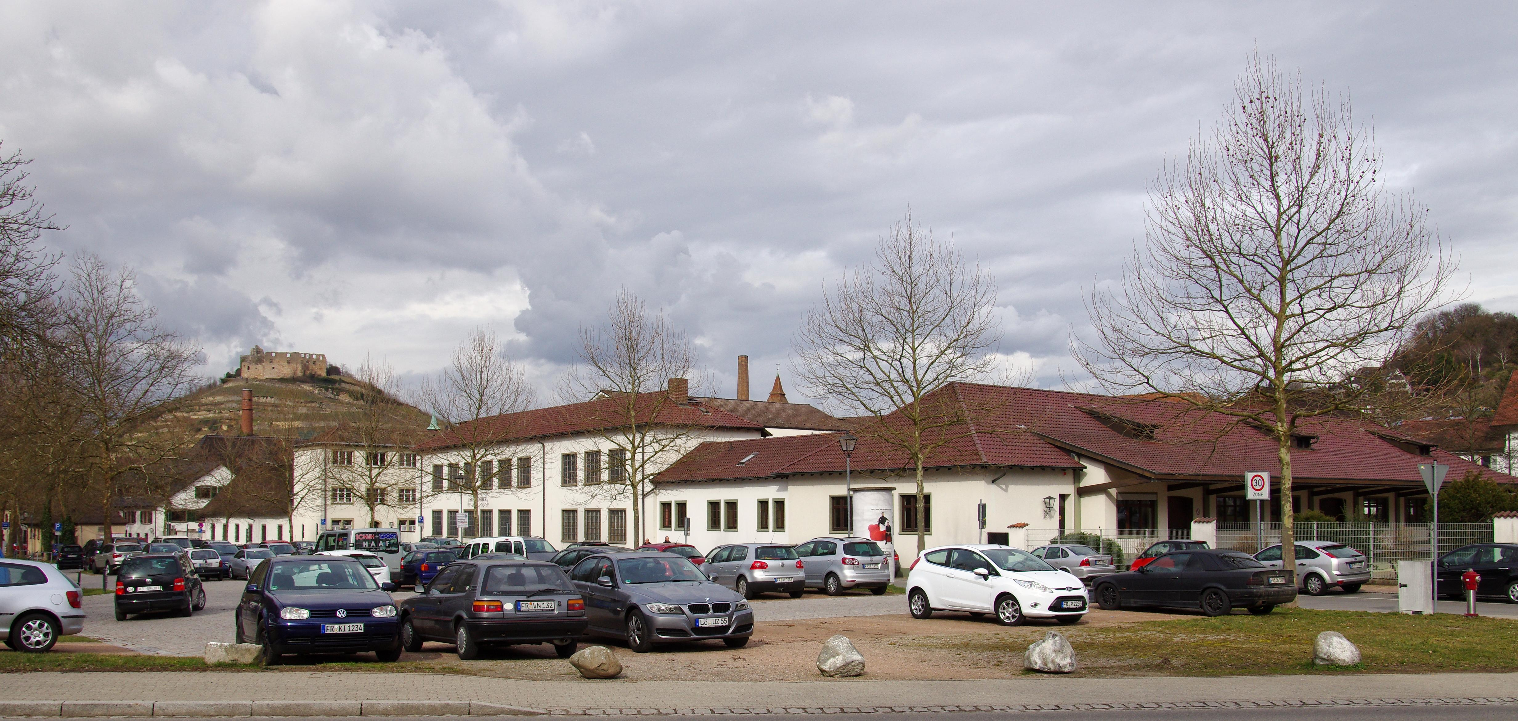 Blick auf Burg und Schladerer